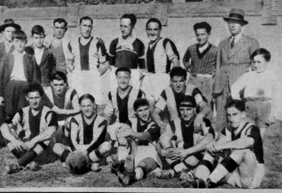 En esta foto se puede observar a Enrico Carzino en su última temporada en el A.S.P Imperia temporada 1932-1933.